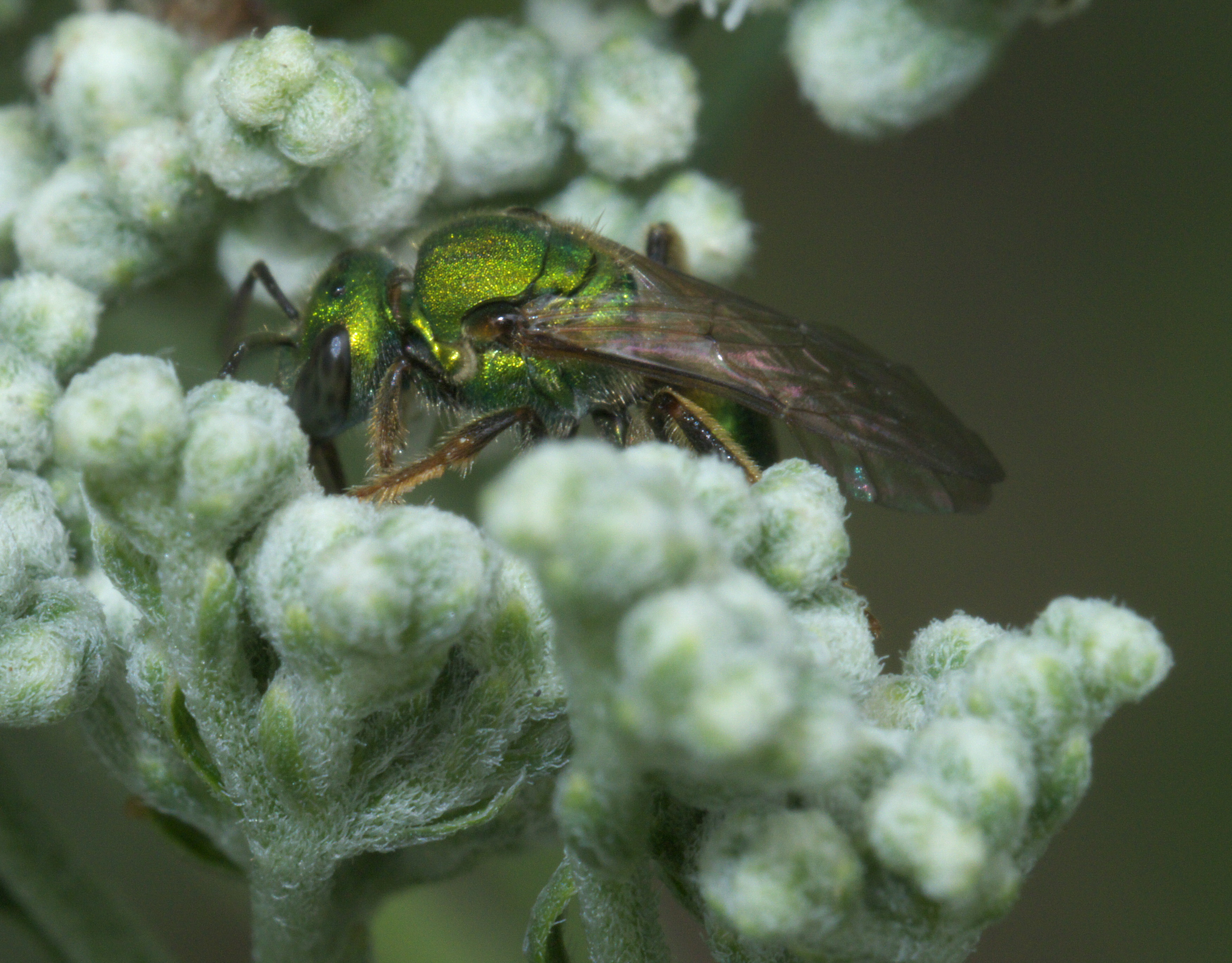 Augochlora pura, pure green augochlora, Size: 7-8 mm, ID Confidence: 98